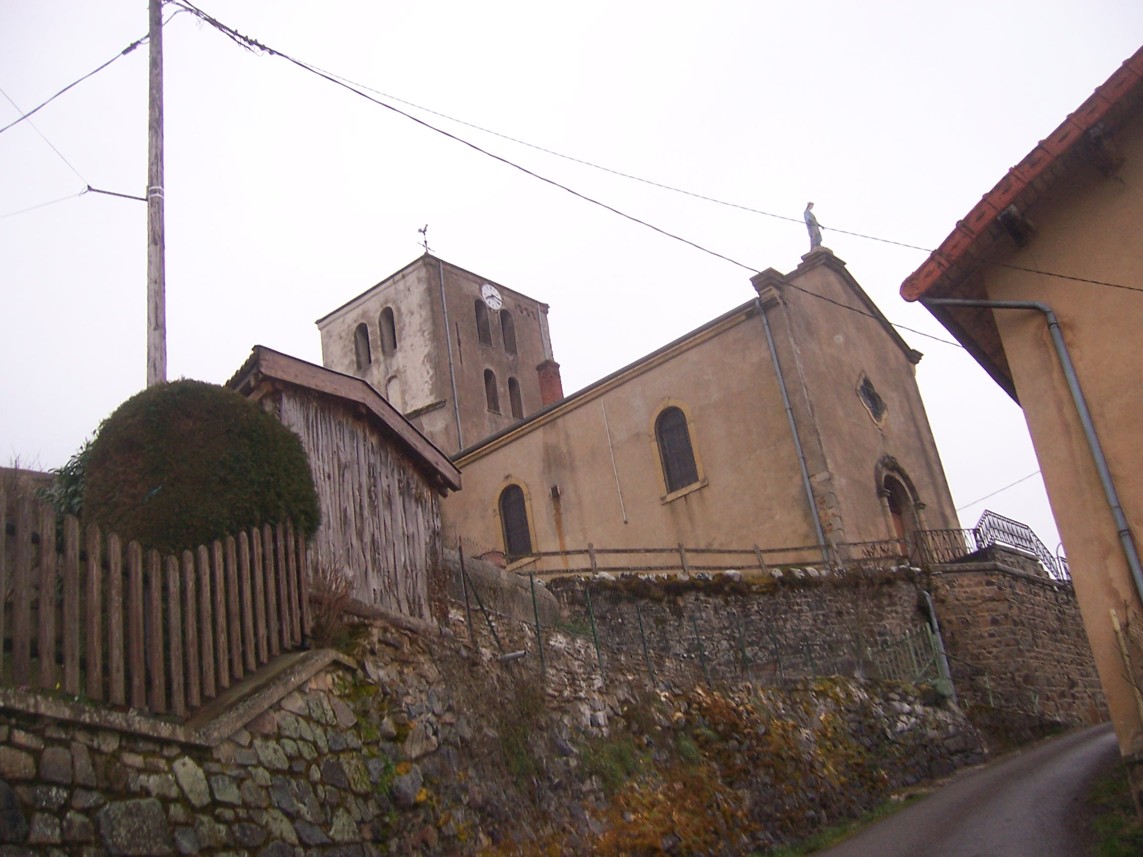 Eglise de Saint-Pierre-le-Vieux